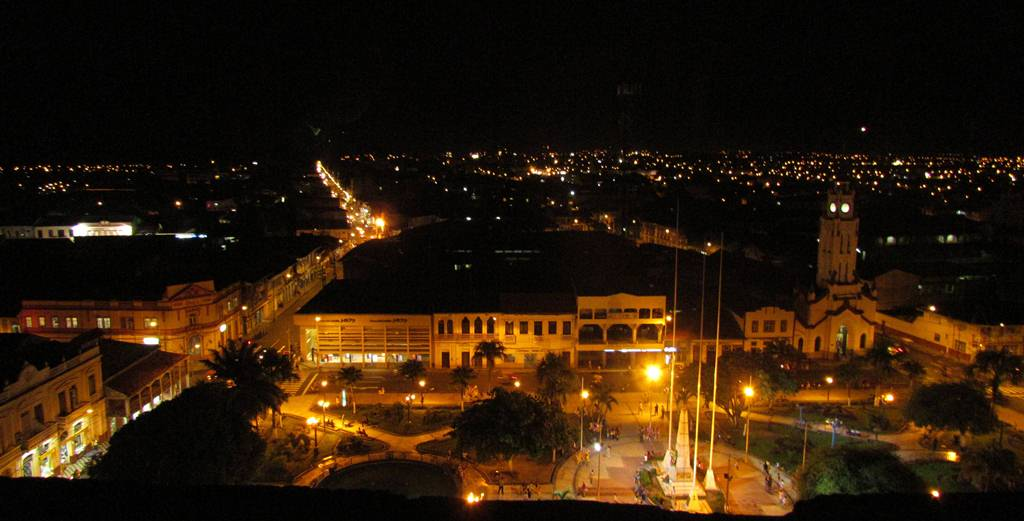 Vista amplia de Iquitos en la noche.